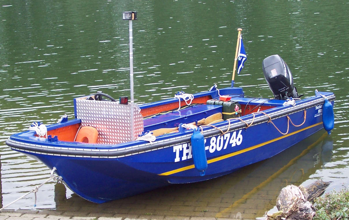 Mehrzweckarbeitsboot Technisches Hilfswerk